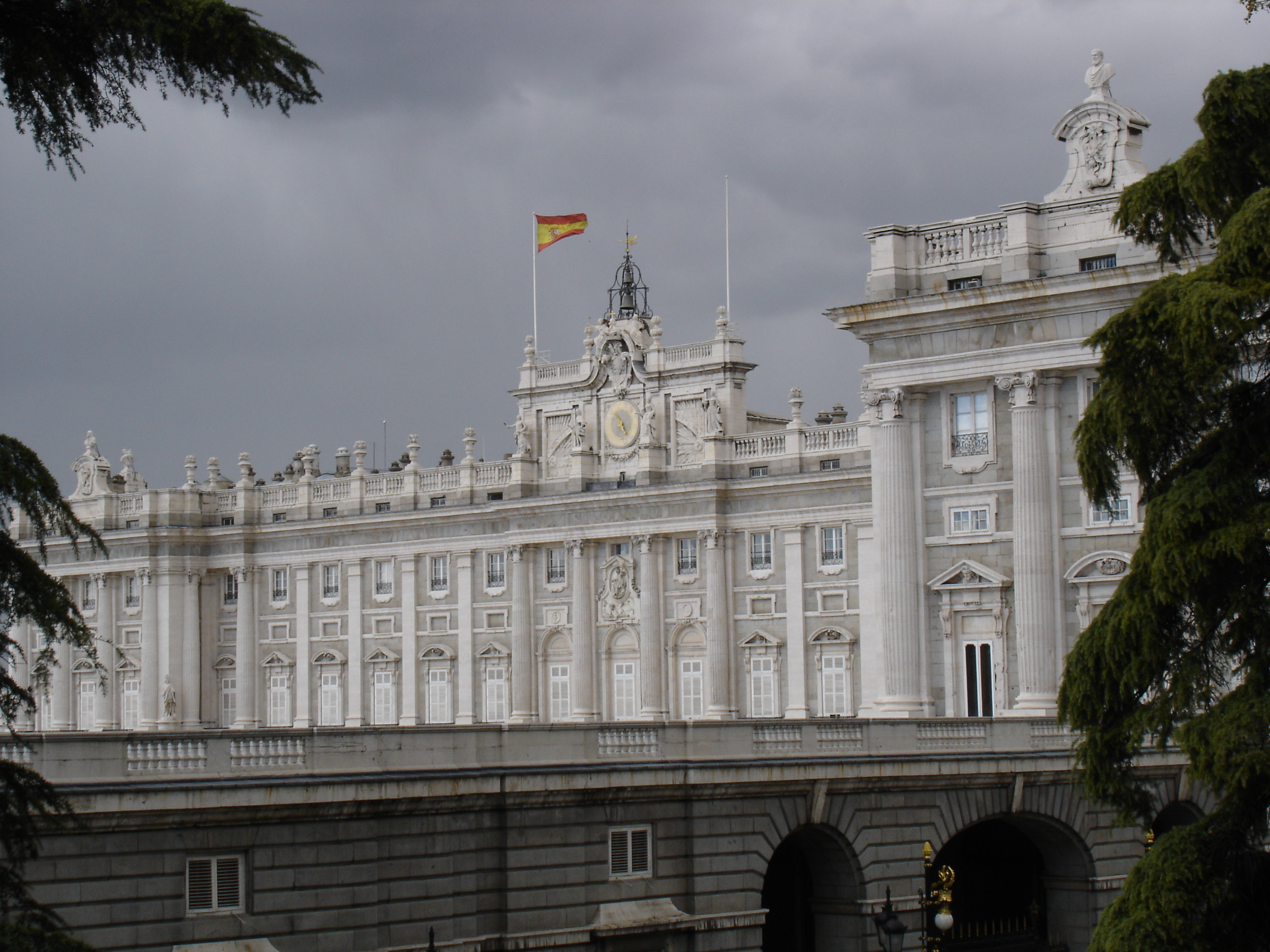 Palacio de Oriente. Madrid